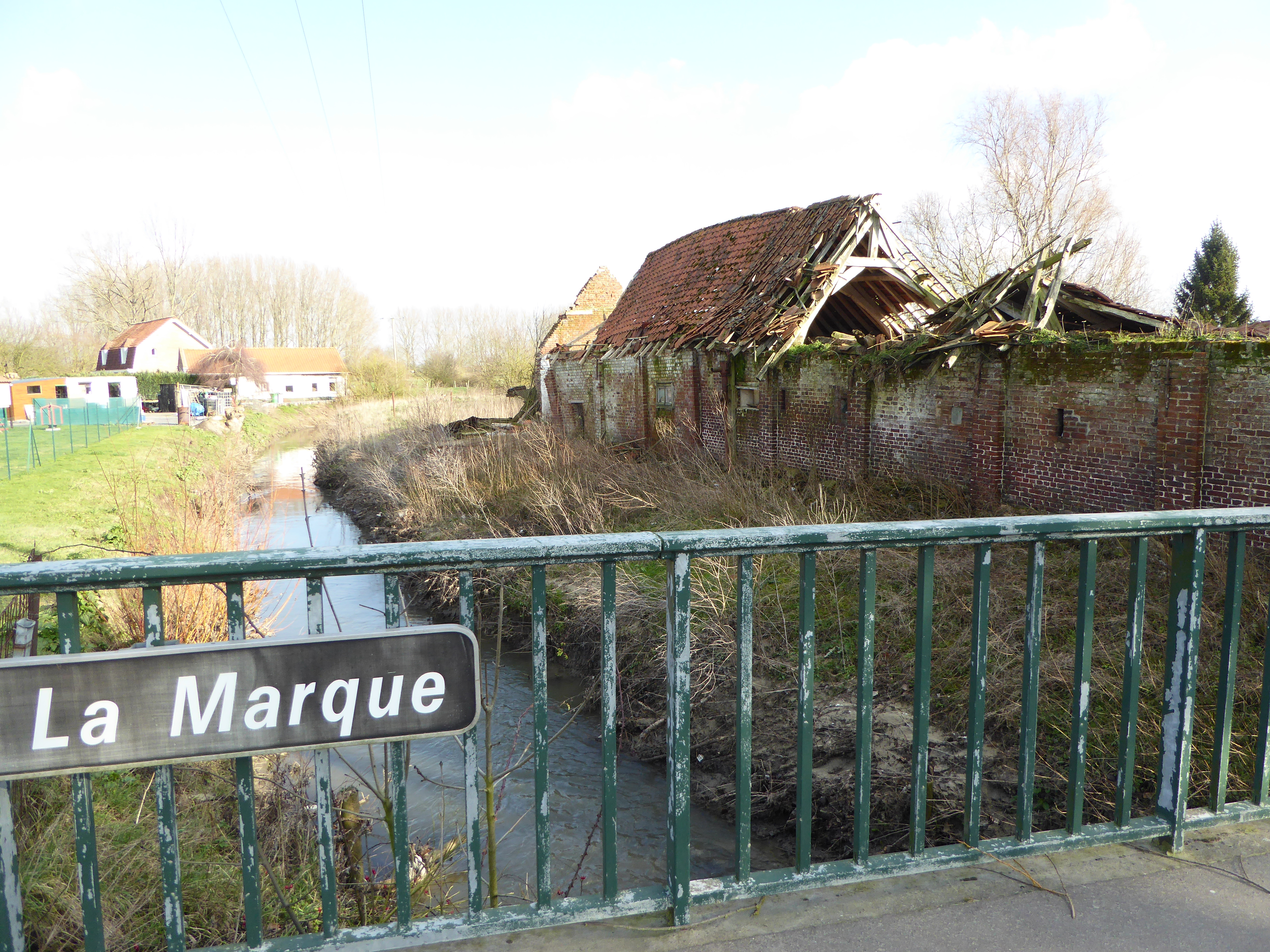 La Marque rue Jean Jaurès' Ennevelin Nord.-France